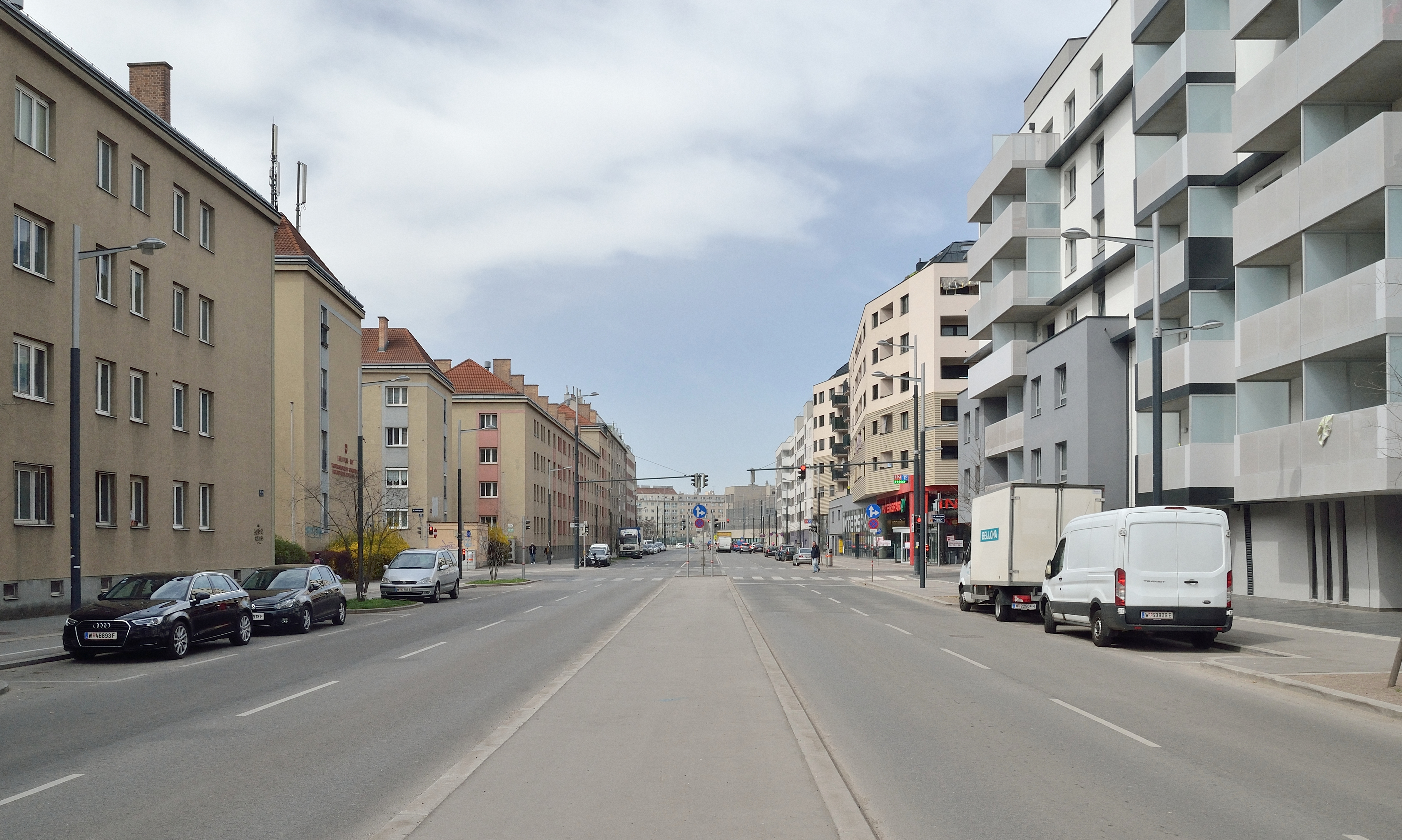 Gudrunstraße, Höhe Steudelgasse, Blick nach Westen. Links der Emil-Fucik-Hof.